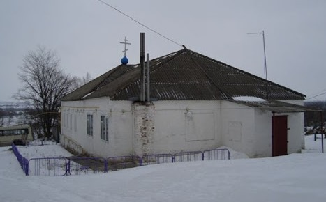 в здании бывшего детского сада в период с 6.01.1999 - по 20.11.2014 располагался храм